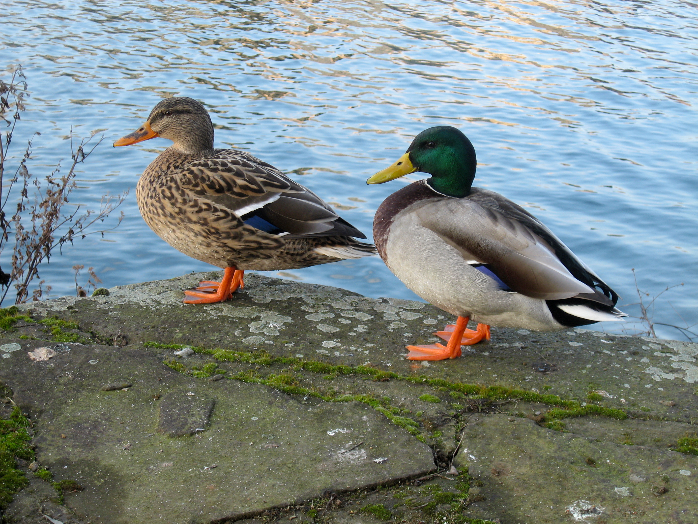 Dusiburg, Innenhafen